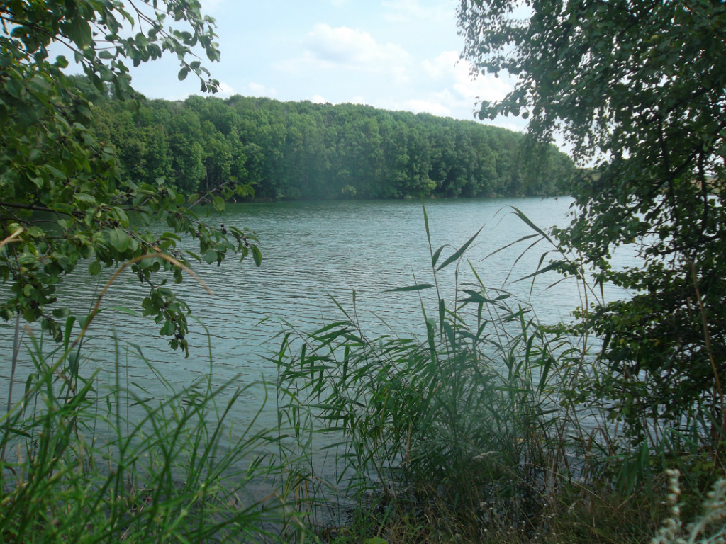 Долина реки Кривец: Пожарово, Измалковский район, Липецкая область This image is related to the protected area of Russia number 4810084